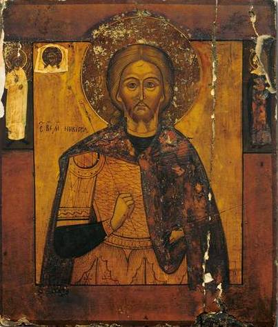 "Hl. Märtyrer Nikita. Am Rand das nicht von Menschenhand geschaffene Bild Christi sowie Schutzengel und Hl. Märtyrerin Natalia. Nordrussland, 3. Viertel 19. Jh. 31 x 26 cm"